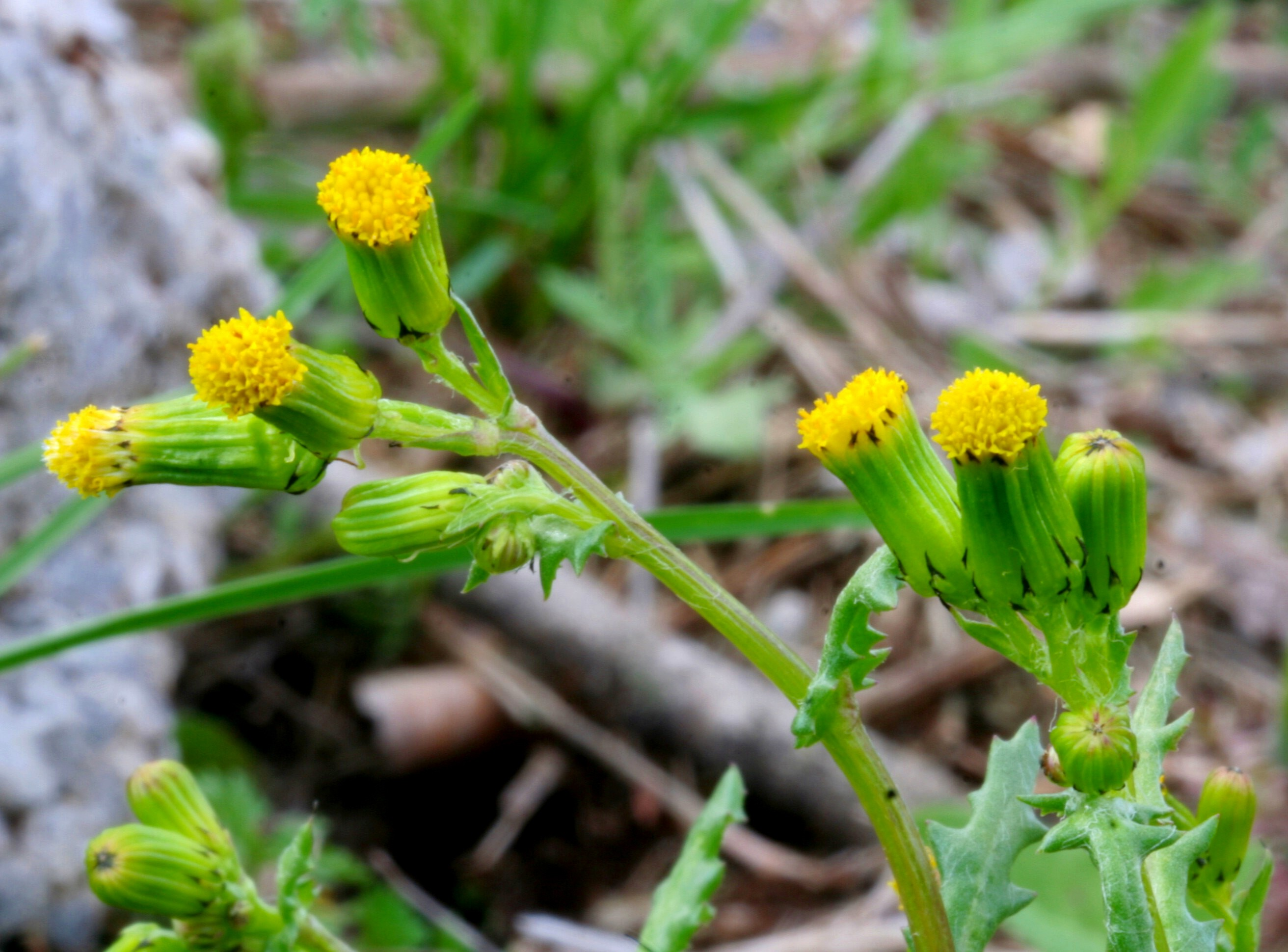 Senecione comune - Villa Prima, Limana (BL), 350 m s.l.m.